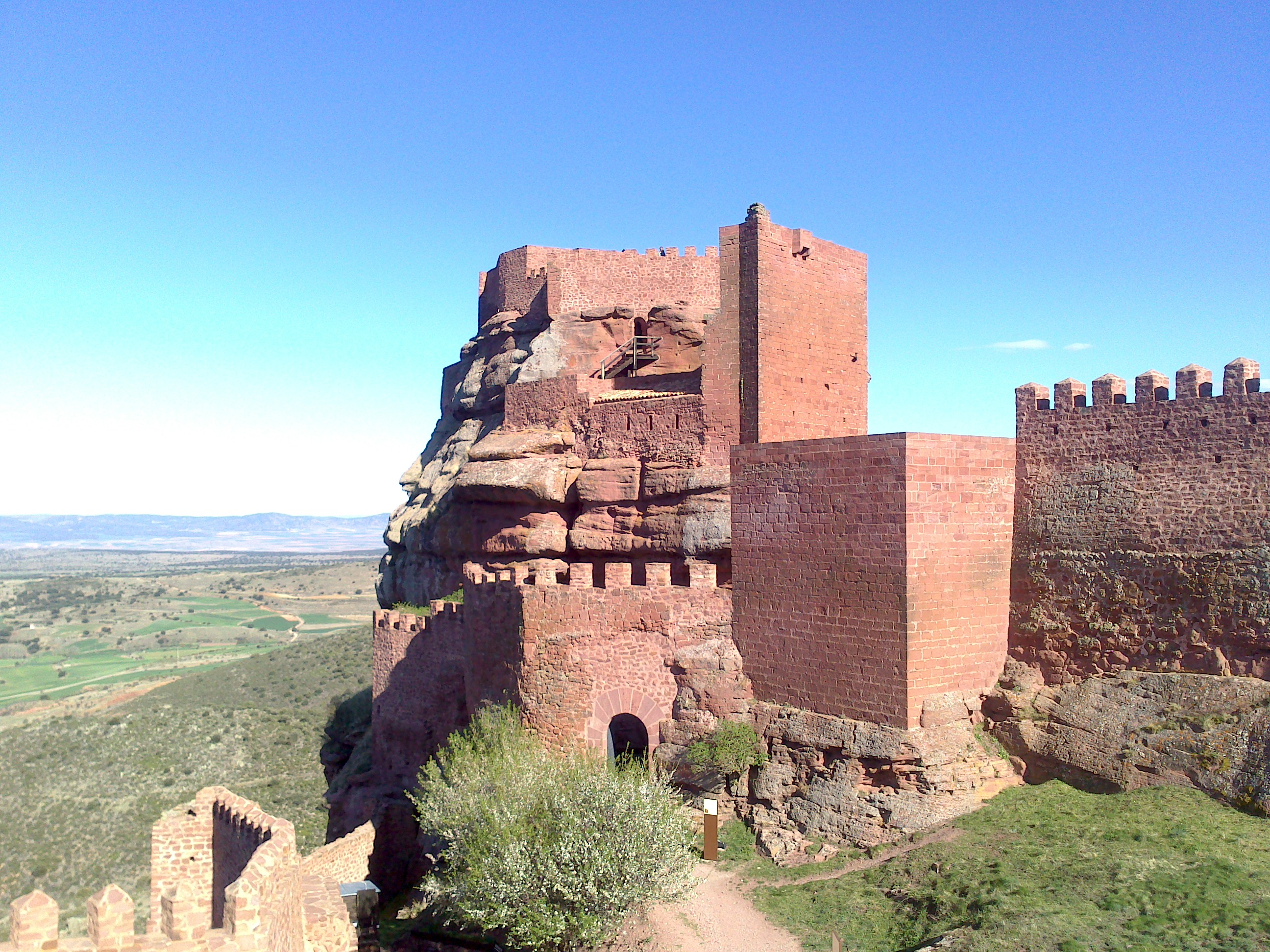 Rodeado de un entorno natural único, sus constructores aprovecharon la topografía original del terreno para construir un enclave defensivo. Se asienta sobre una prolongación rocosa de rodeno fuertemente escarpada, que pertenece a la terminación sur de Sierra Menera. El lugar fue ocupado desde finales de la Edad de Bronce, para ser ocupada de nuevo en la época de dominación musulmana, en los siglos X y XI. Pero es en la Edad Media cuando su importancia estratégica se acrecienta por su posición limítrofe entre los reinos de Castilla y Aragón y de los señoríos de Albarracín, Molina de Aragón y Comunidad de Daroca. El castillo se amplió y reformó a mediados del siglo XIV.